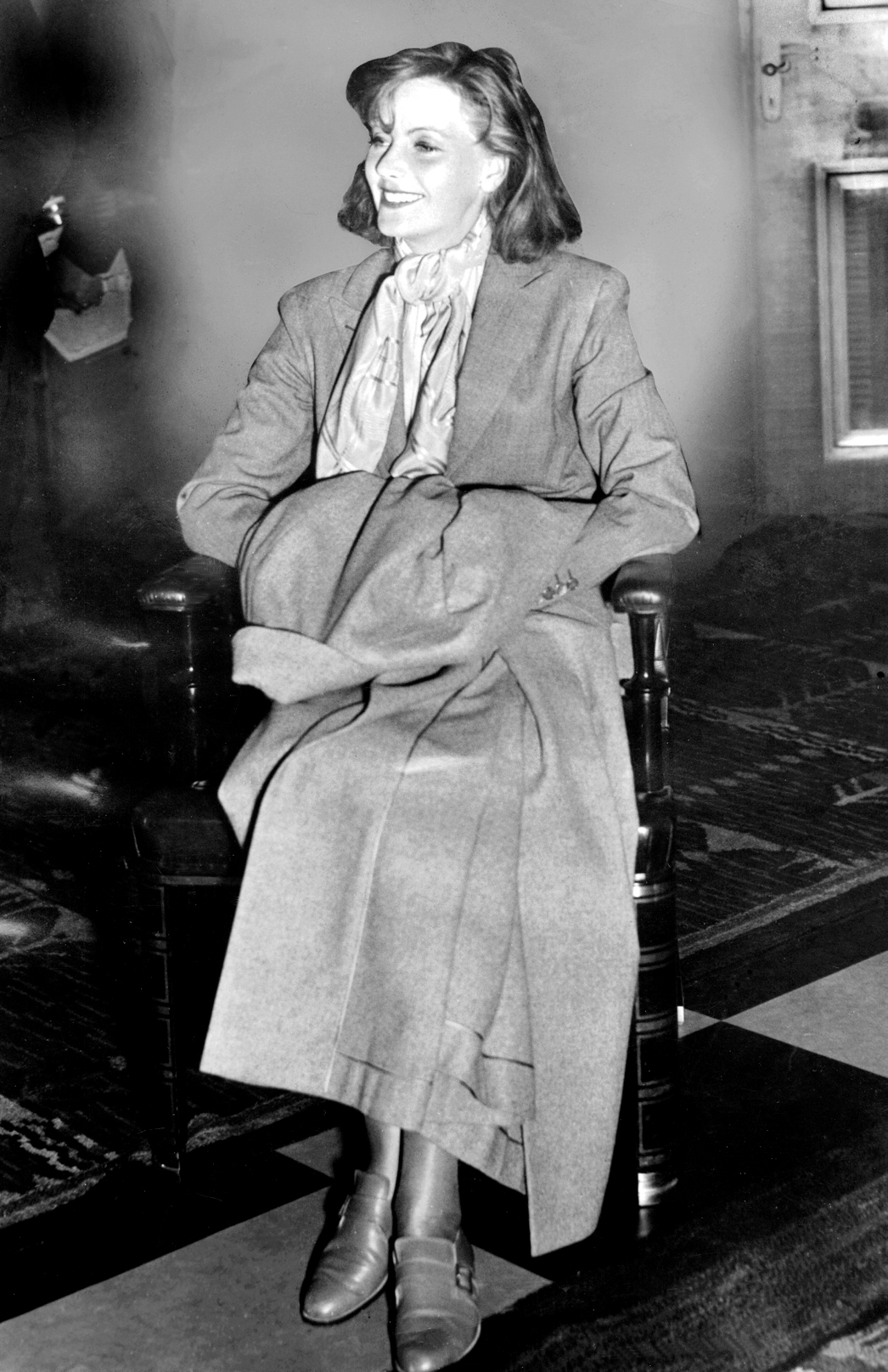 Den gudomliga. Greta Garbo (1905-1990) var en av Hollywoods mest gåtfulla stjärnor. Hon drog sig tillbaka redan 1941 och flyttade till New York. Bilden är från 1935 då hon stod på toppen av sin karriär.